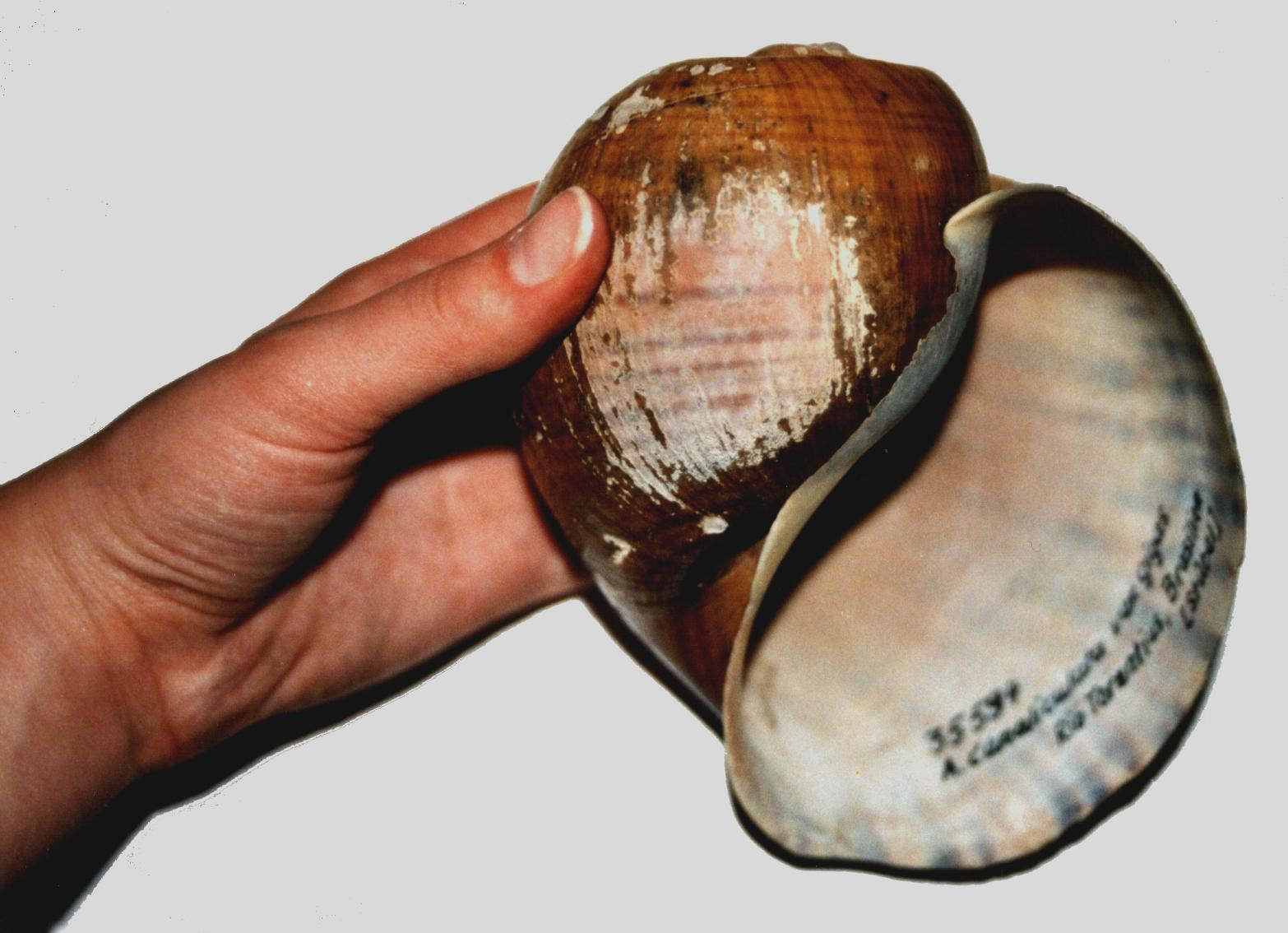 Gehäuse von Pomacea canaliculata aus dem Naturkundemuseum in Berlin